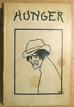 Dessin de William Thomas Horton